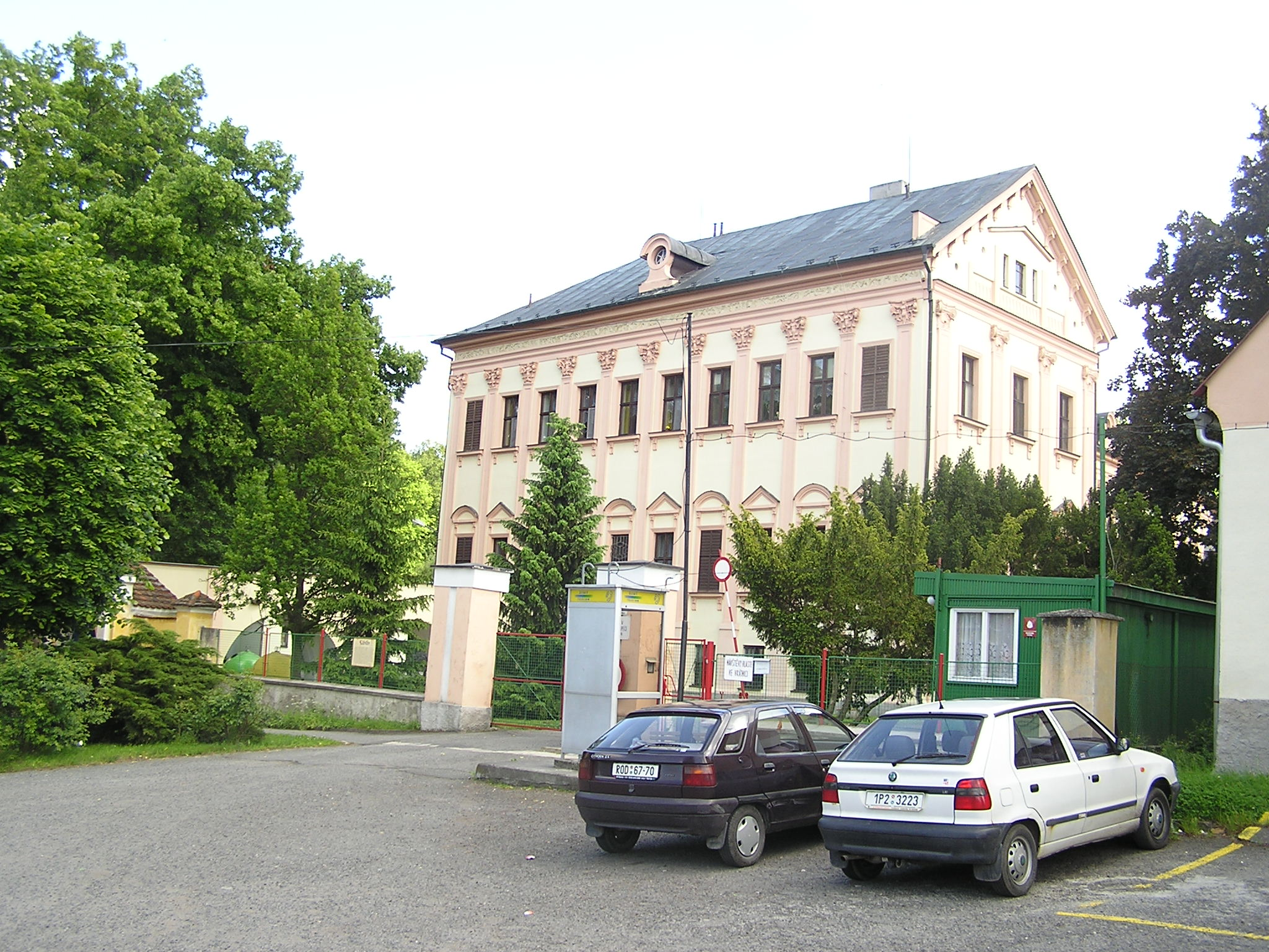 Zámek Liblín, Liblín čp. 1, okres Rokycany.